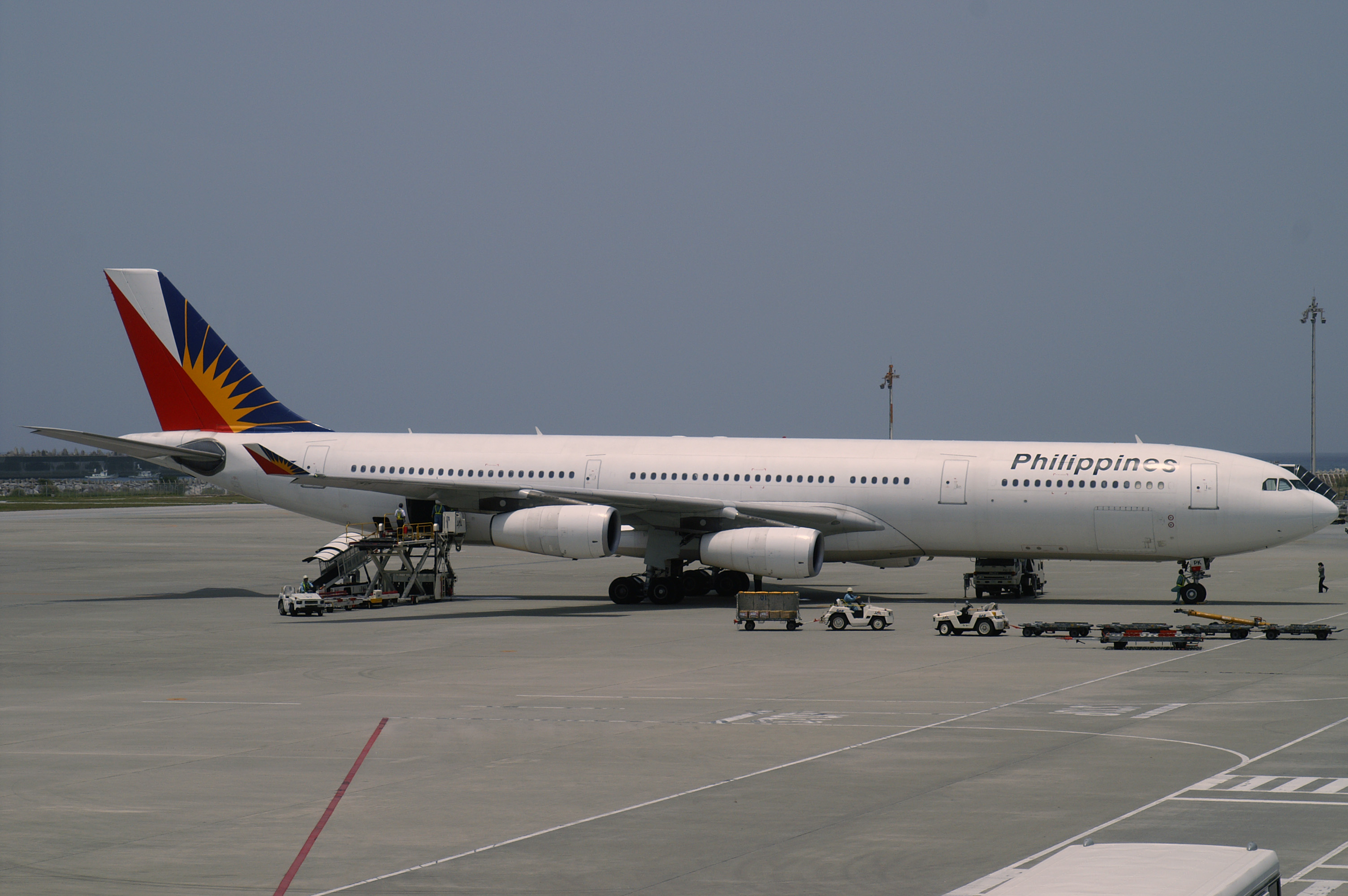 Philippine Airlines Airbus A340-313X (F-OHPK) at Naha Airport, Okinawa, Japan. (2006/04/25 Naha Airport, Okinawa, JAPAN)